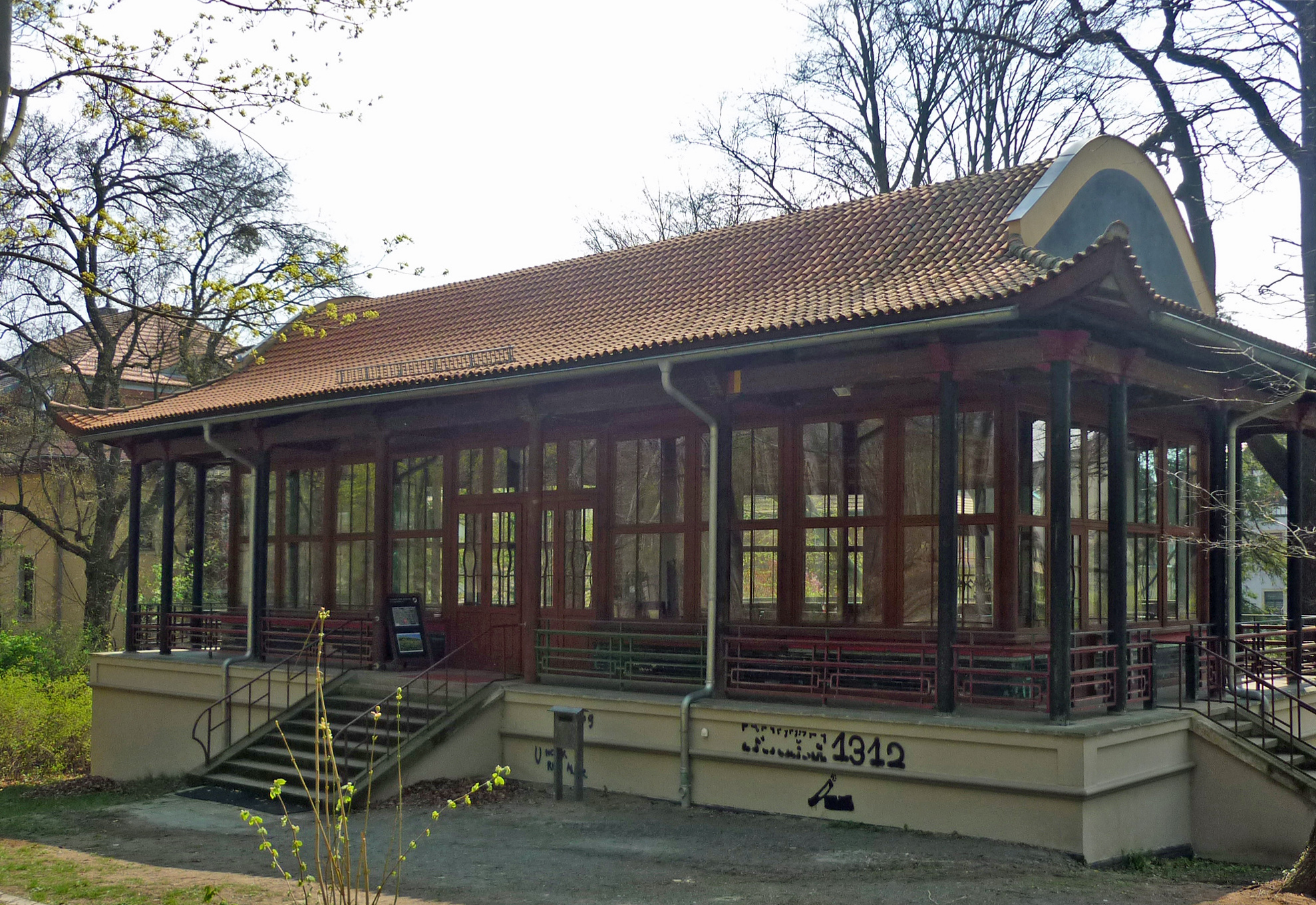 Chinesischer Pavillon in Dresden-Weißer Hirsch